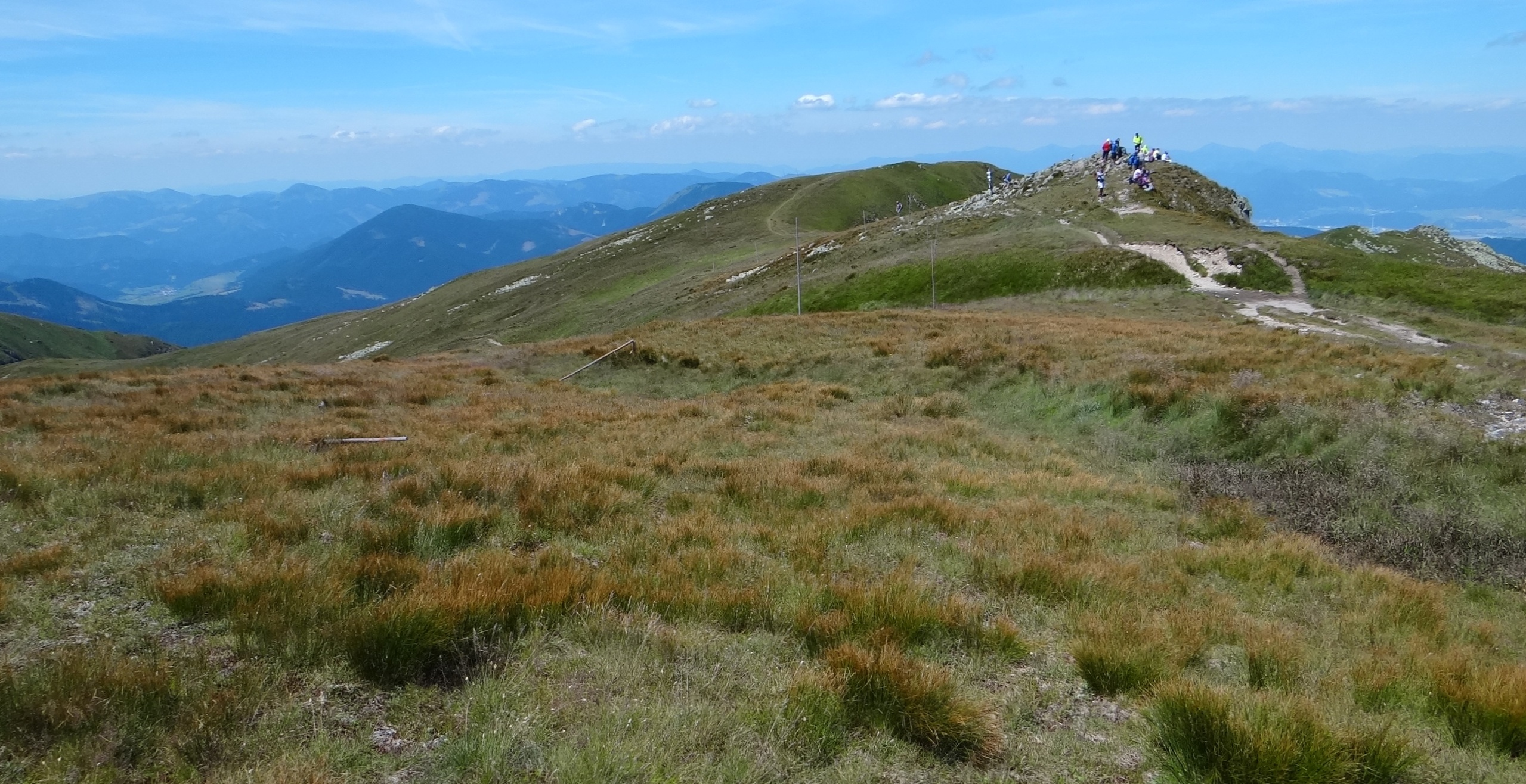 Chabenec